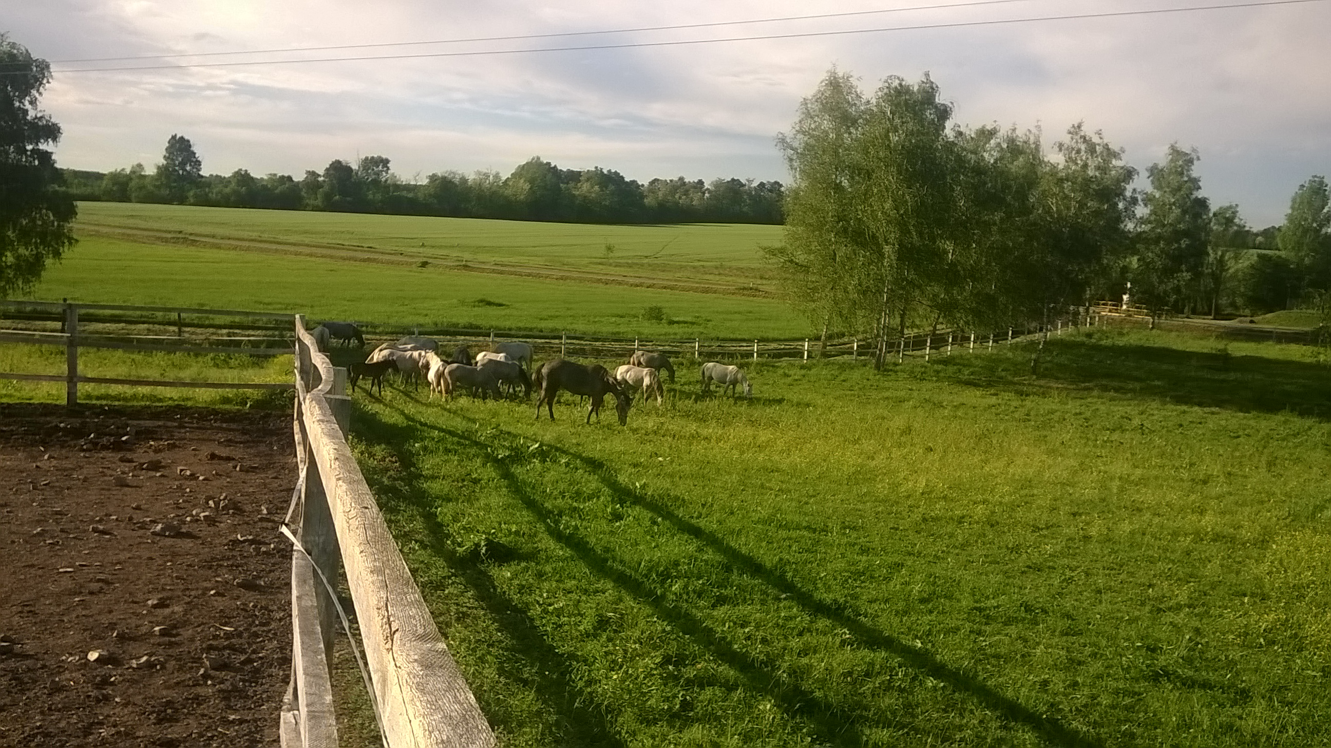 Lipizzaner Gestüt Lipik